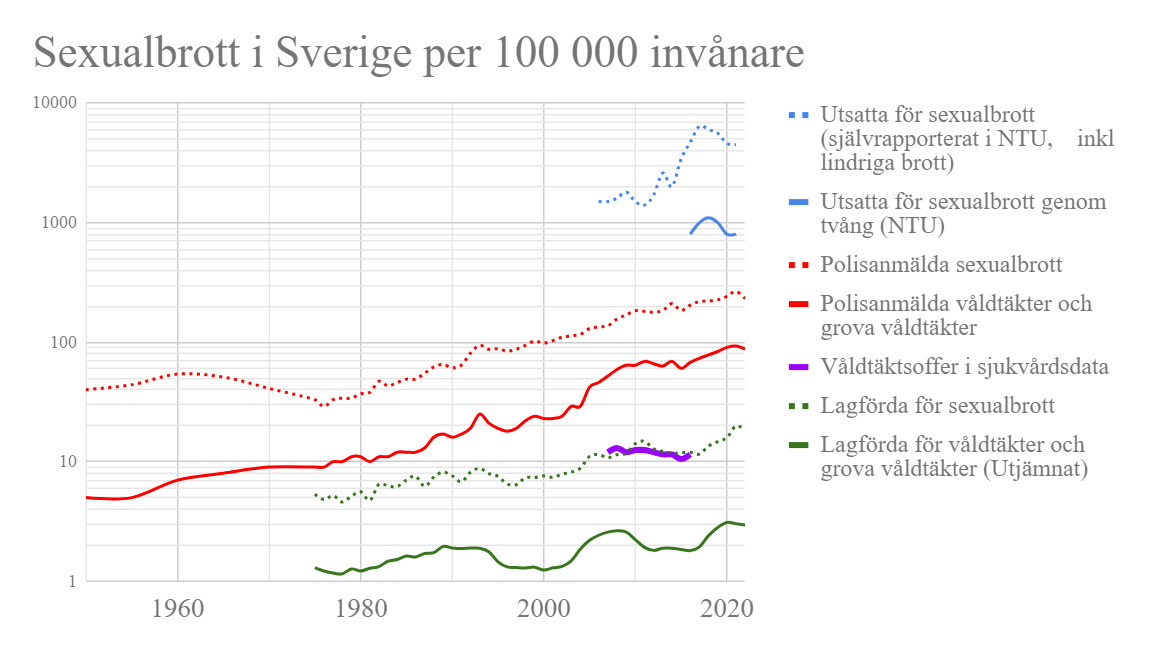 Antal sexualbrott i Sverige per 100 000 invånare över tid. Logaritmisk vertikal axel. Datakällor: BRÅ: Nationella trygghetsundersökningen (NTU) 2006-2018 BRÅ: Anmälda brott per 100 000 invånare 1950-2018. BRÅ: Lagföringsbeslut efter lagföringstyp 1975-2018. SCB: Medelbefolkning Socialstyrelsen ackording to Dagens nyheter 2018-05-09